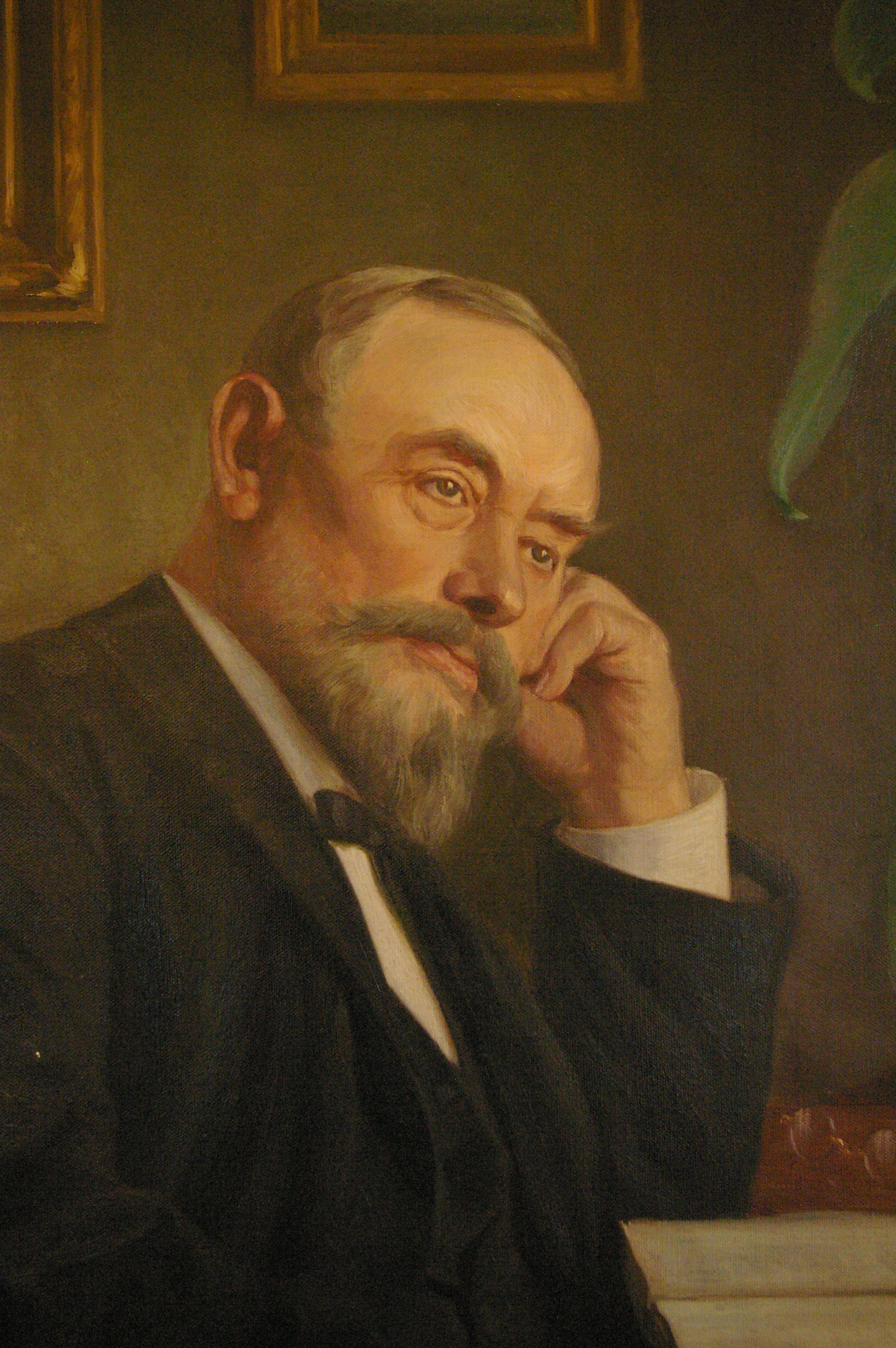 Anders Ulrik Isberg d.ä. Målning på Malmö Stadsarkiv.